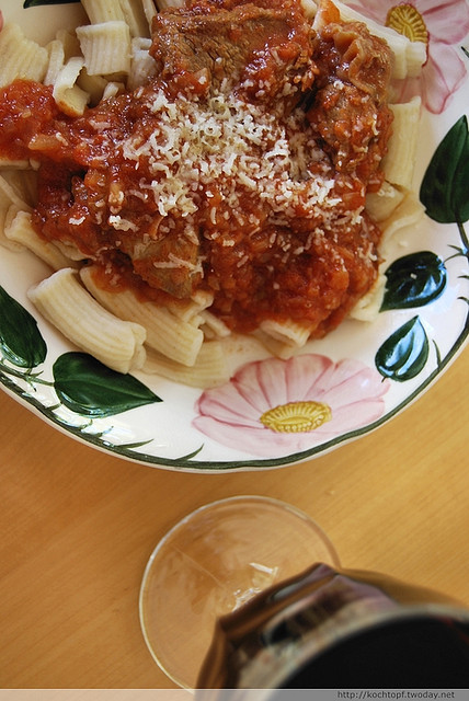 Ragù napolitain sur pâtes